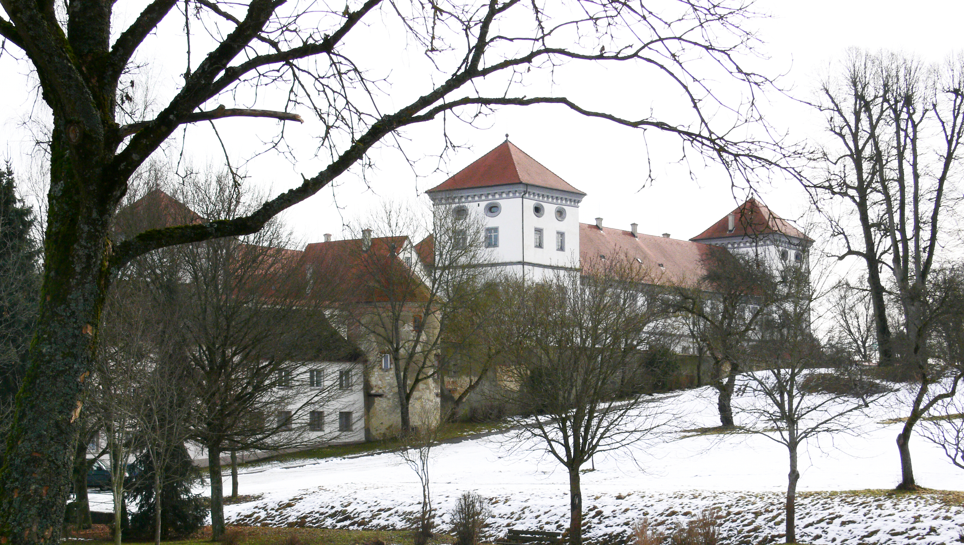 Meßkirch, Germany: Schloss, Westflügel (Parkflügel), von Nordwesten aus gesehen